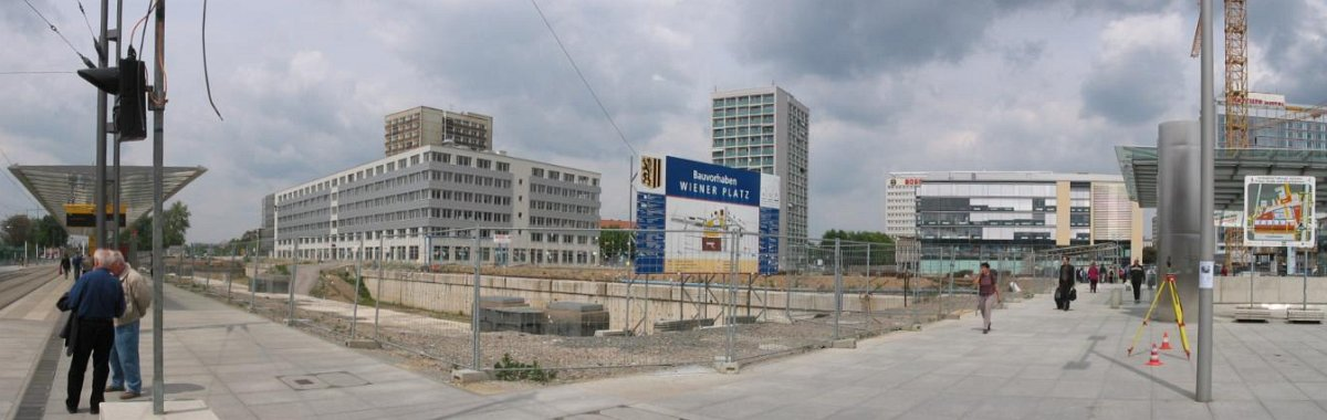 Bauarbeiten am Wiener Platz 2004 (Baustelle des Kugelhauses), Dresden 18. Mai 2004. Panorama aus drei Fotos zusammengesetzt mit AutoStitch. Links der nördliche Teil der Straßenbahnhaltestelle „Hauptbahnhof“. Daneben, eingezäunt und mit Bauschild die Baustelle des „Kugelhaus“ (fertiggestellt und eröffnet im Sommer 2005, siehe Image:Kugelhaus Dresden.jpg). Dahinter, nicht zu sehen, die weitere Baugrube „MK5“. Ganz rechts der Eingang zu den neu eröffneten Untergrundpassagen am Wiener Platz. Das Schild rechts illustriert die Führung der Verkehswege während der Baustelle.